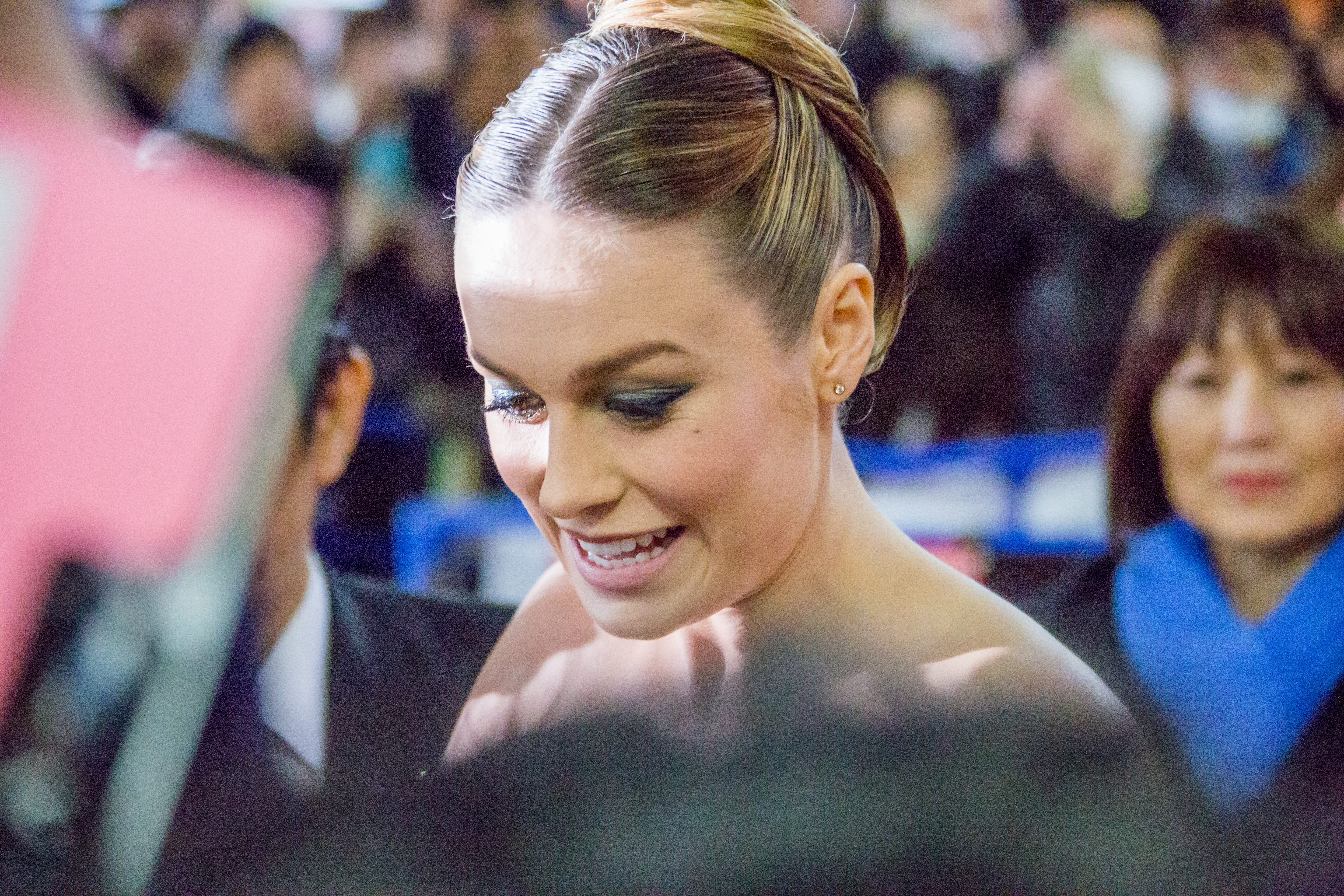 キングコング: 髑髏島の巨神 ジャパンプレミア レッドカーペット ブリー・ラーソン